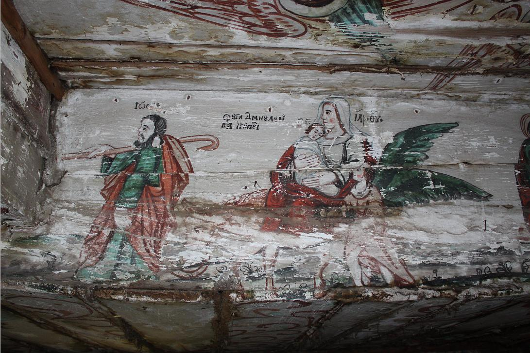 Biserica de lemn din Sânmihaiu Almaşului, judeţul Sălaj.